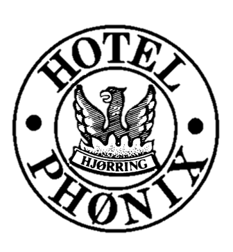 Hotel Phønix Hjørring Logo